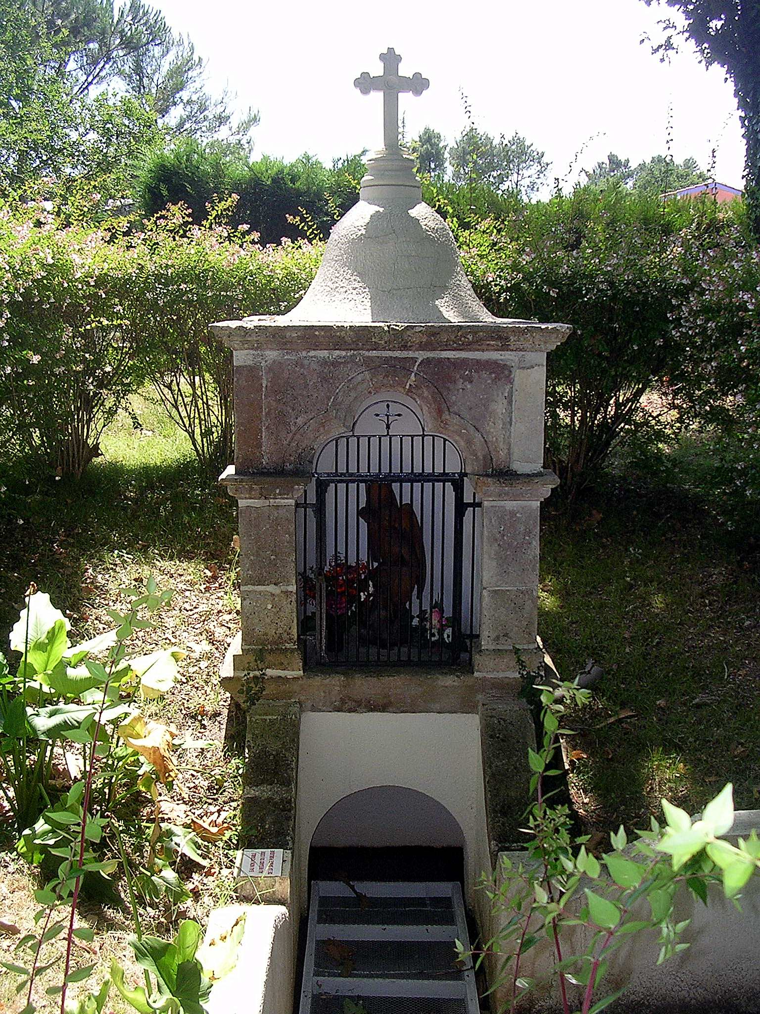 La source Saint-Michel de Bias, dans le département français des Landes